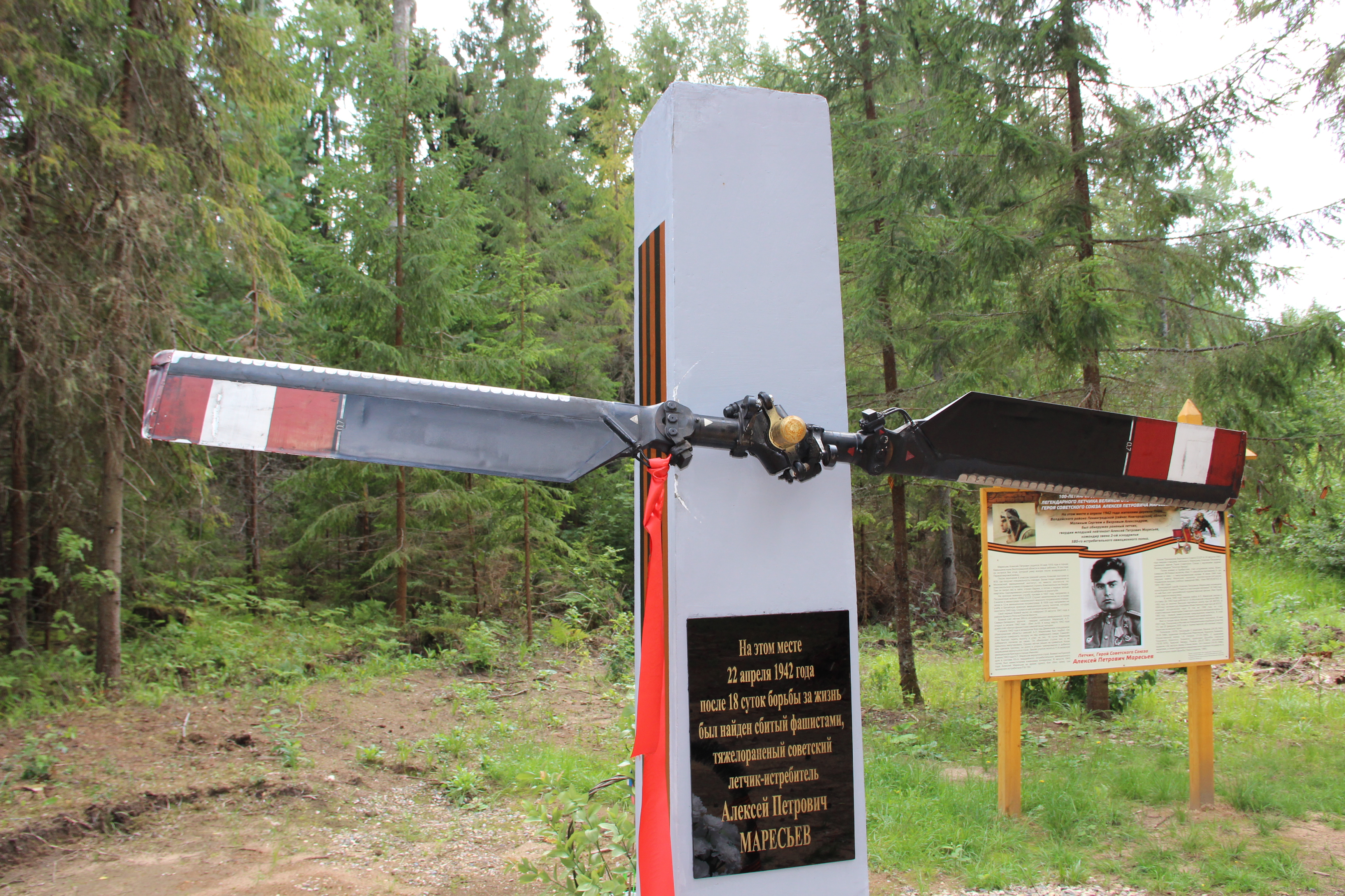 Новая памятная стела, установленная в 2016 году на месте, где был найден тяжело раненный летчик А.П. Маресьев